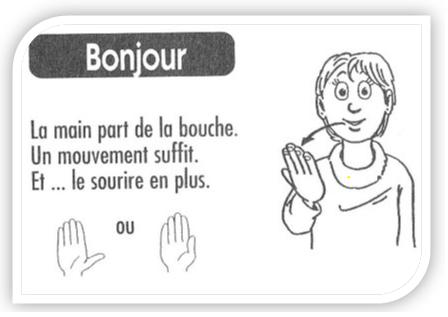 Bonjour LSF